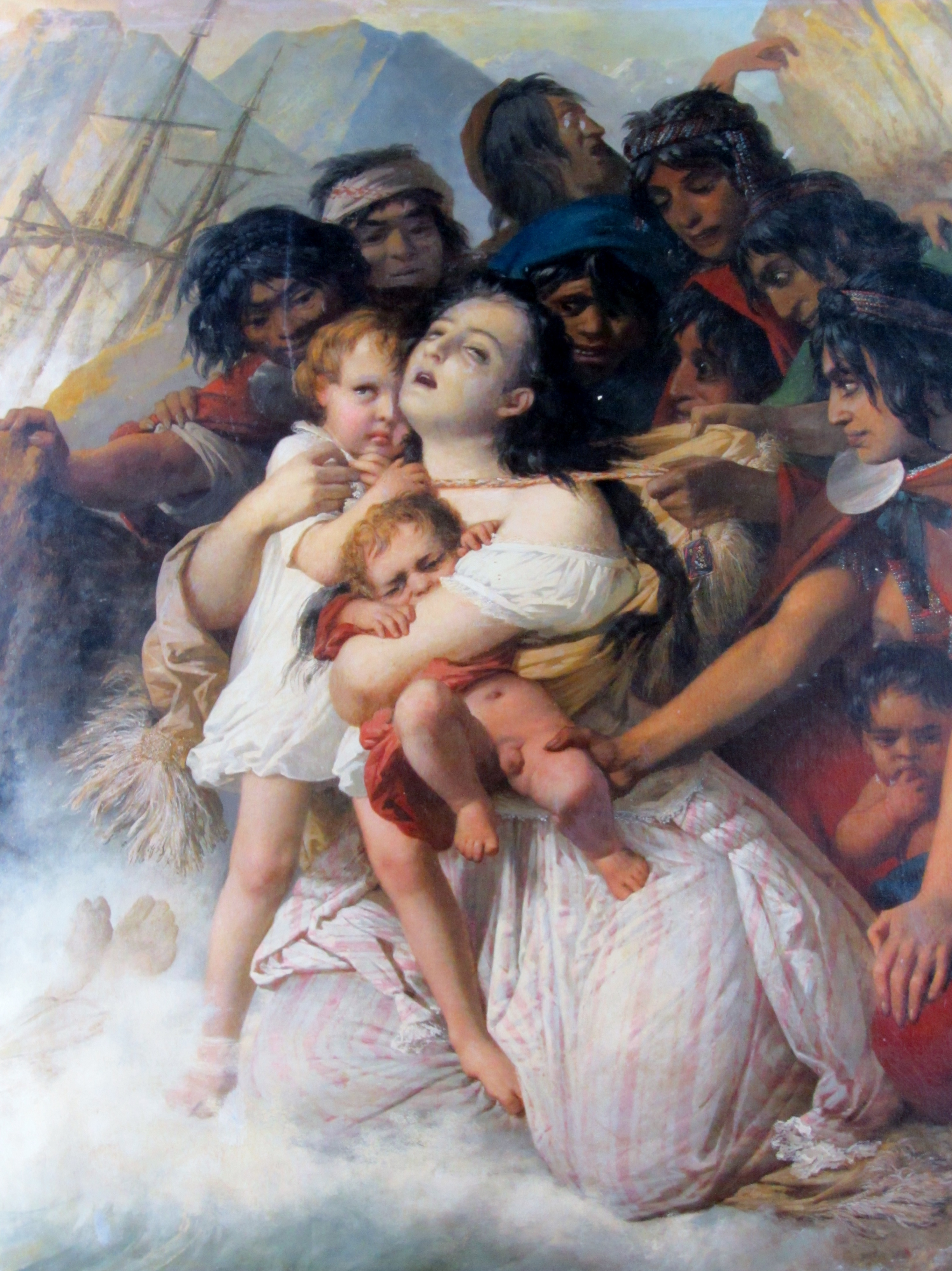 Elisa Bravo Jaramillo iba en el bergantín el Joven Daniel, que había zarpado de Valparaíso el 23 de julio rumbo a Valdivia y que naufragó a la altura de la desembocadura del río Toltén, en la playa de Puancho, costa de Cautín, zona del lago Budi. Sucedió en la noche del 31 de julio al 1 de agosto de 1849; culparon a los mapuches de haber raptado a Elisa, que habría sobrevivido al naugragio y pasado a ser mujer del cacique Kurín o Curín. La leyenda dice que los supervivientes levantaron un campamento en la playa, pero que pronto fueron matados por los indios. Según algunos historiadores modernos, como Sergio Villalobos, Premio Nacional de Historia (Chile), en realidad, no hay pruebas de que hubiera supervivientes ni de que Elisa no hubiera perecido y estuviera efectivamente cautiva en la Araucanía (véase Vida fronteriza en la Araucanía; el fragmento sobre el naufragio puede consultarse en Google Books. Monvoisin pintó otro cuadro sobre el tema: Elisa Bravo Jaramillo de Bañados, mujer del cacique o Elisa Bravo en cautiverio.